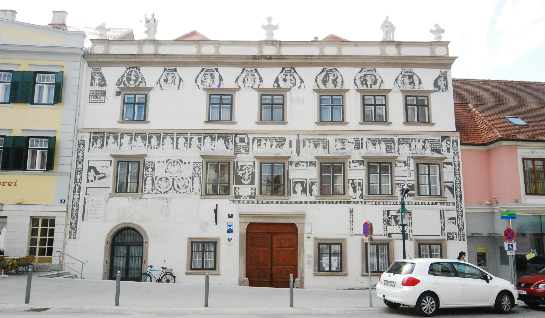 Bezirksgericht (Sgraffitohaus) auf dem Hauptplatz von Horn in Niederösterreich